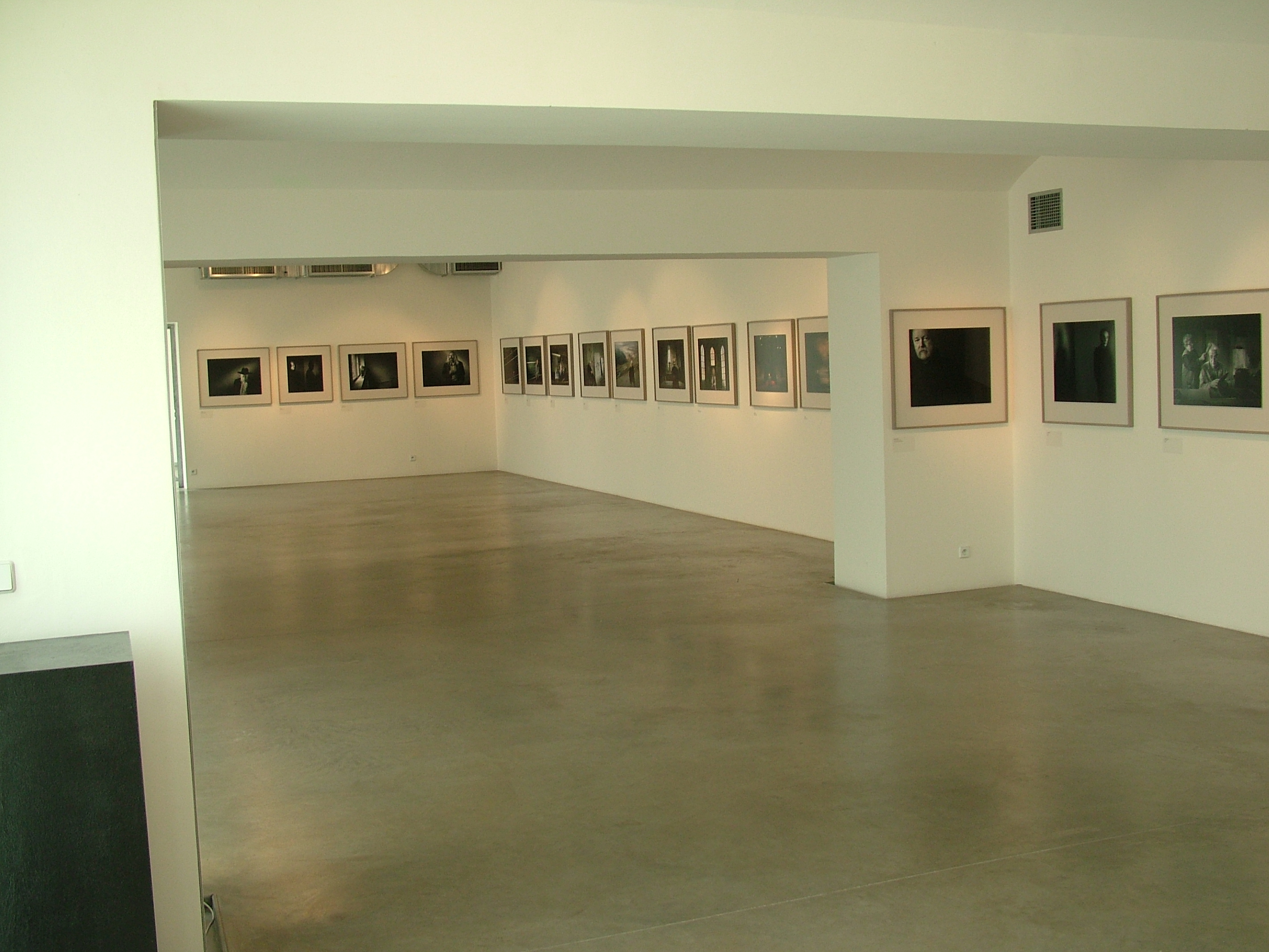 Výstava portrétních fotografií Češi, Kampa Museum, Praha, 2011